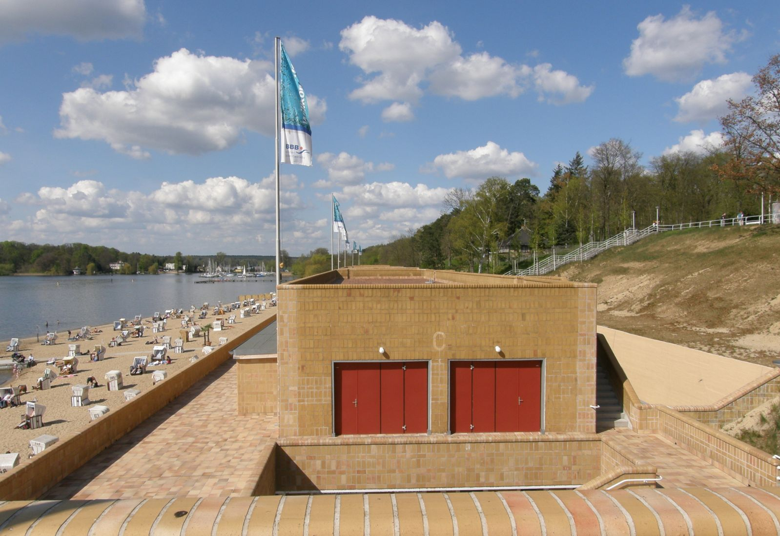 Strandbad Wannsee, Wannseebadweg, Berlin-Nikolassee